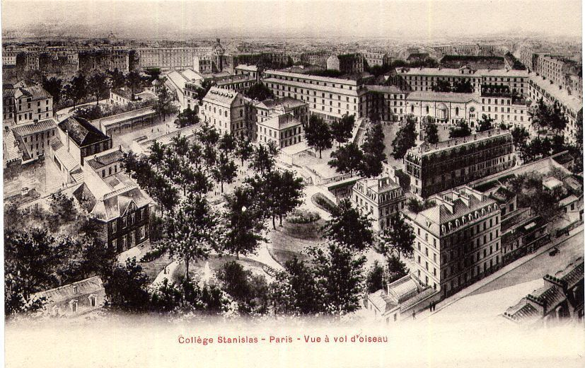 Ce document présente la configuration du Collège Stanislas tel qu'il était à la fin du XIXe siècle. Il s'agit d'une carte postale d'époque. La rue au premier plan est la rue du Montparnasse. On devine à droite le boulevard Raspail et la rue de Rennes au fond à gauche, derrière les arbres. Peu des bâtiments visibles sur cette représentation de l'établissement sont toujours debout : ils ont été rasés dans les années 1970 pour laisser la place aux bâtiments Méjecaze et Ninféi. La petite maison à droite du jardin du premier plan subsiste toujours : il s'agit du Pavillon du Directeur.